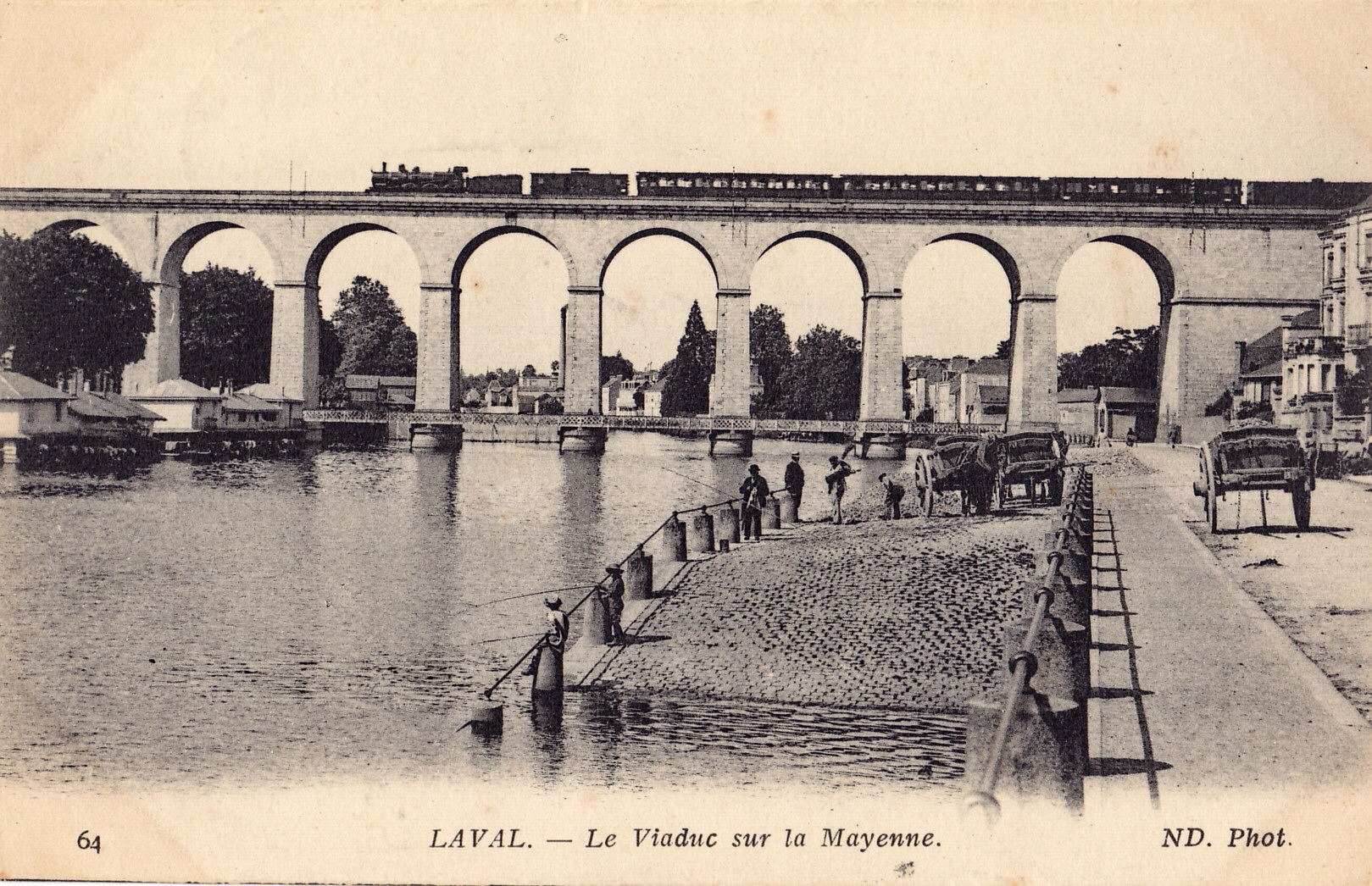 Carte postale ancienne éditée par ND, n°64 :LAVAL - Le Viaduc sur la Mayenne